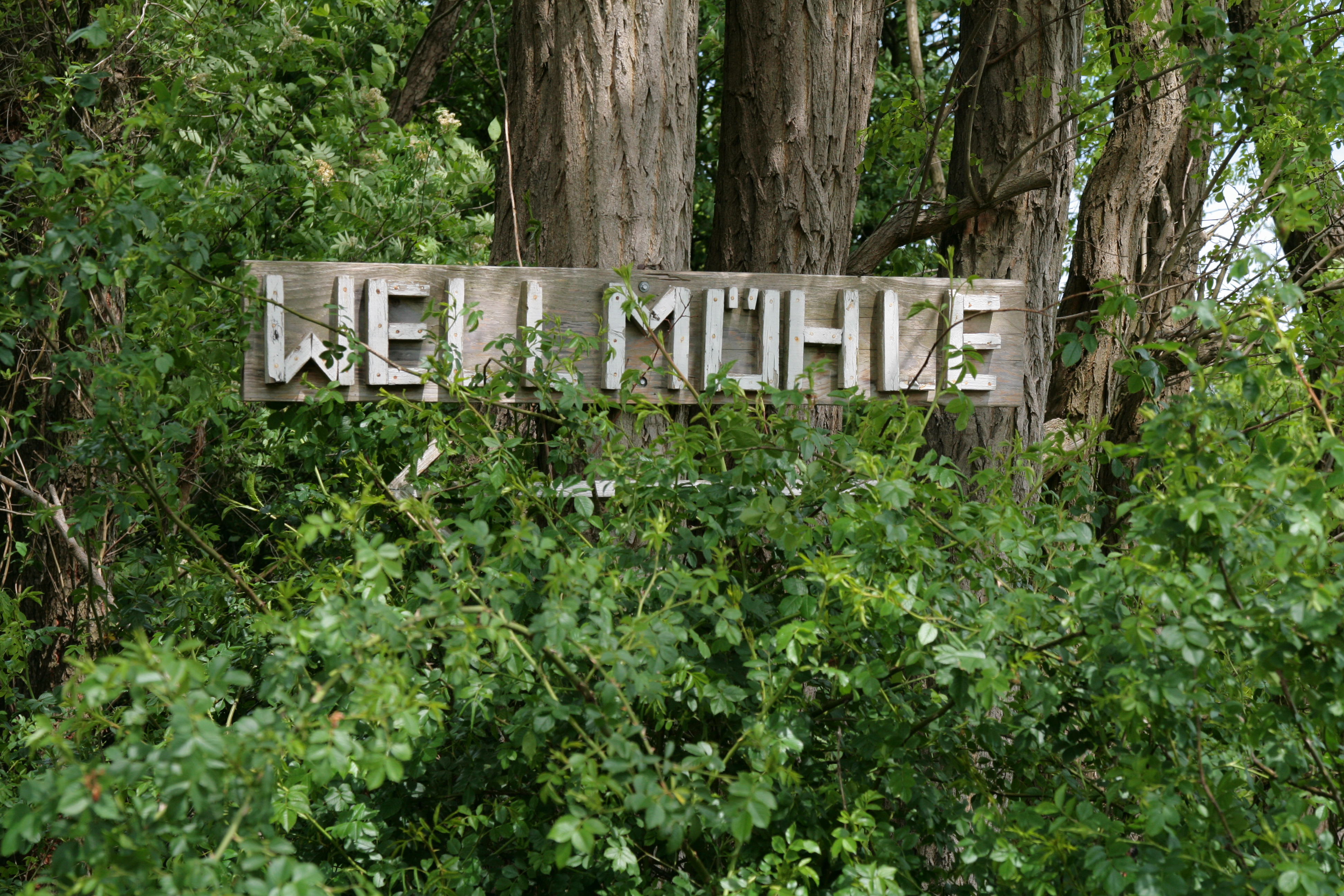 Wellmühle in Wettmar (Burgwedel), Niedersachsen, Deutschland